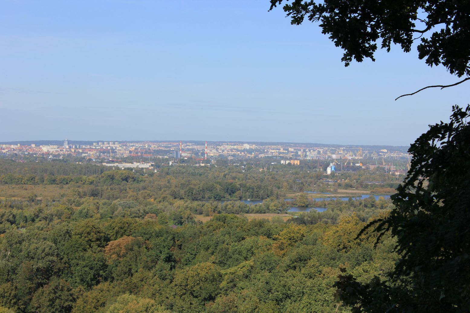 Szczecin-Zdroje - Wzgórze Czanowskie